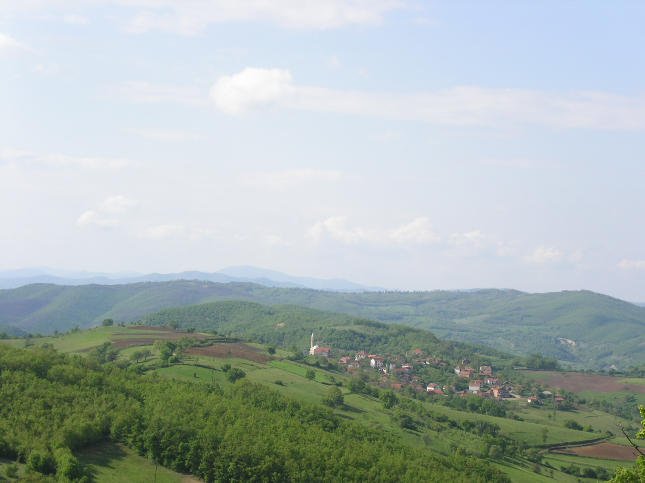 Lloca, vendbanim në Malet e Karadakut, Kosovë